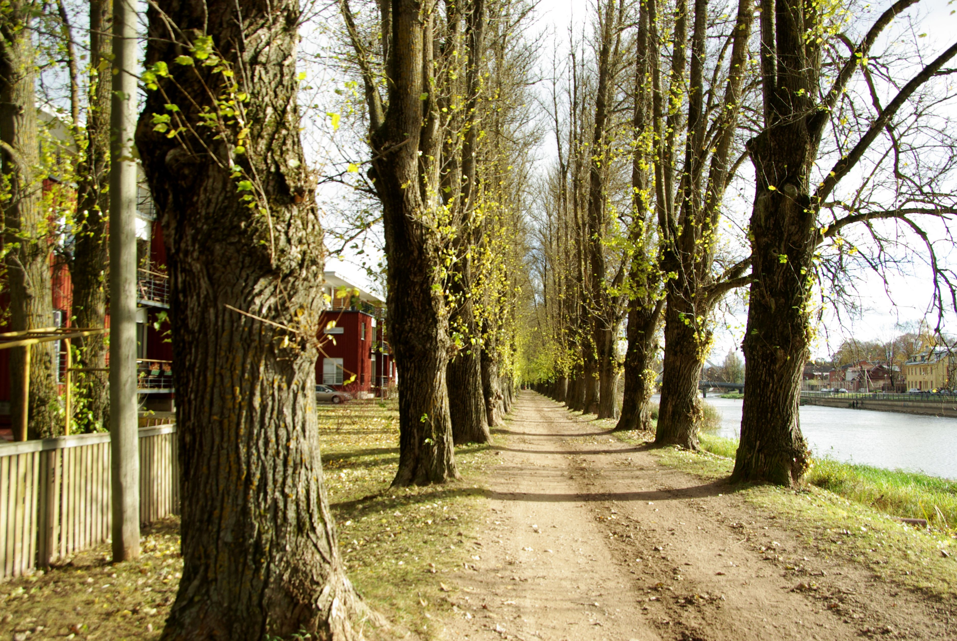 Tartu linn